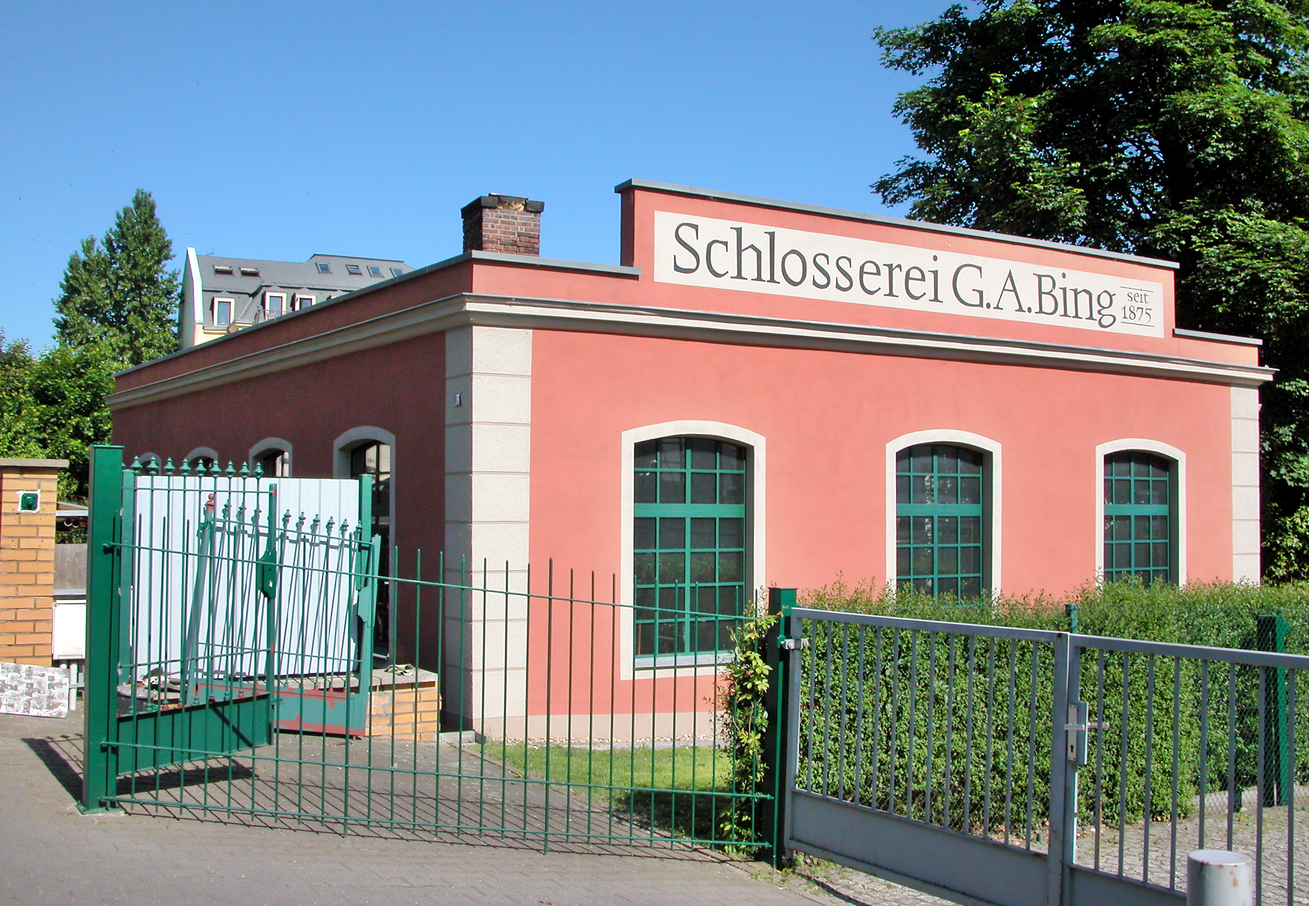 05.06.2010 01187 Dresden-Plauen: Schlosserei G. A. Bing, Würzburger Straße 5 / Ecke Hofmühlenstraße (GMP: 51.034509,13.704934). Firma seit 1875. [DSCN42153.TIF]20100605010DR.JPG(c)Blobelt